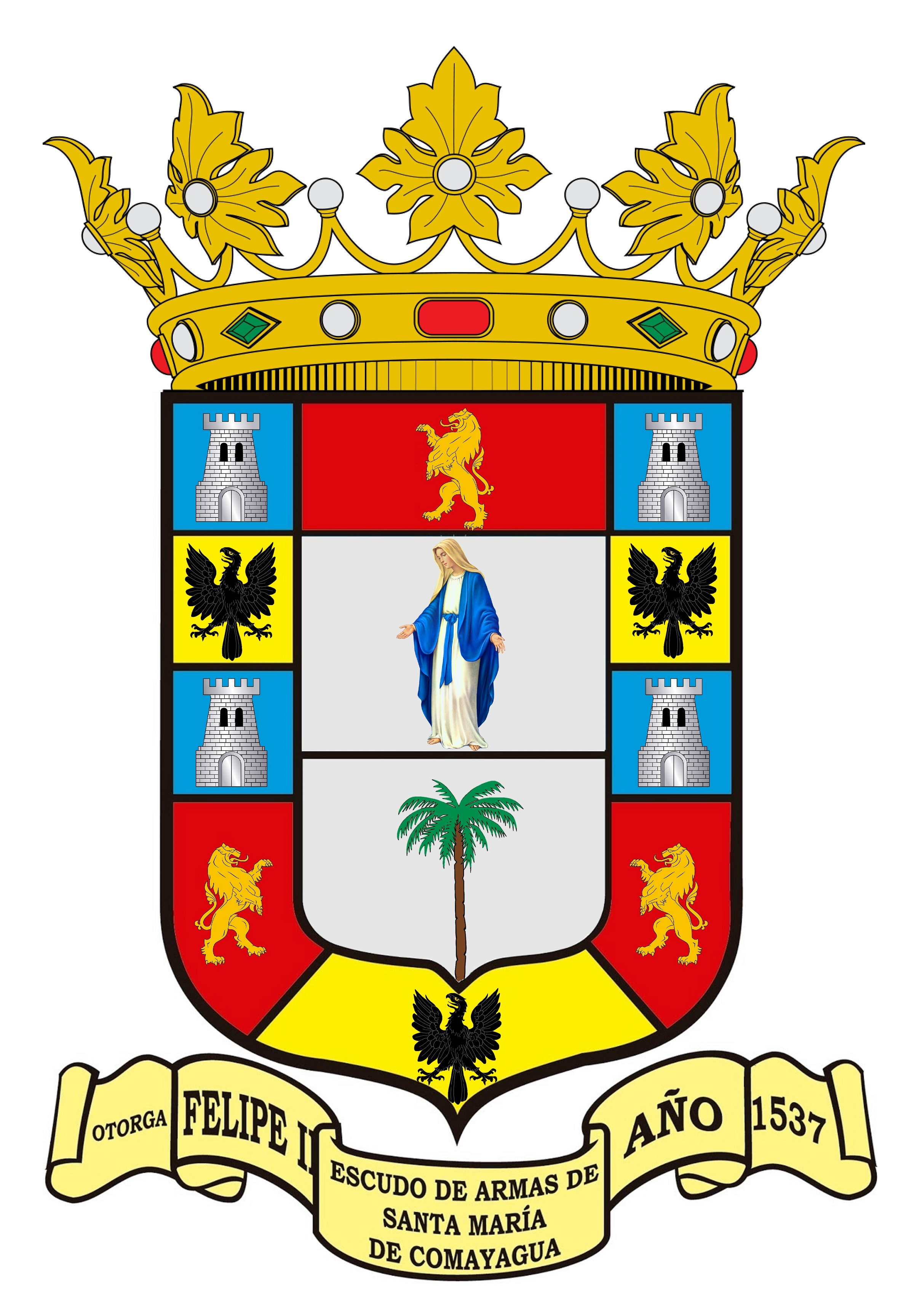 1.- PRIMER ESCUDO Escudo partido en dos, en el primer campo de plata se encuentra la santísima concepción, Patrona de la Ciudad, en el segundo del mismo metal se encuentra una palmera de sinople.- La bordura del Escudo es de metal de oro, gules y azur y en ella se encuentran cuatro castillos de plata, en campo azur tres leones de oro de campo de gules y tres águilas de sable en campo de oro.